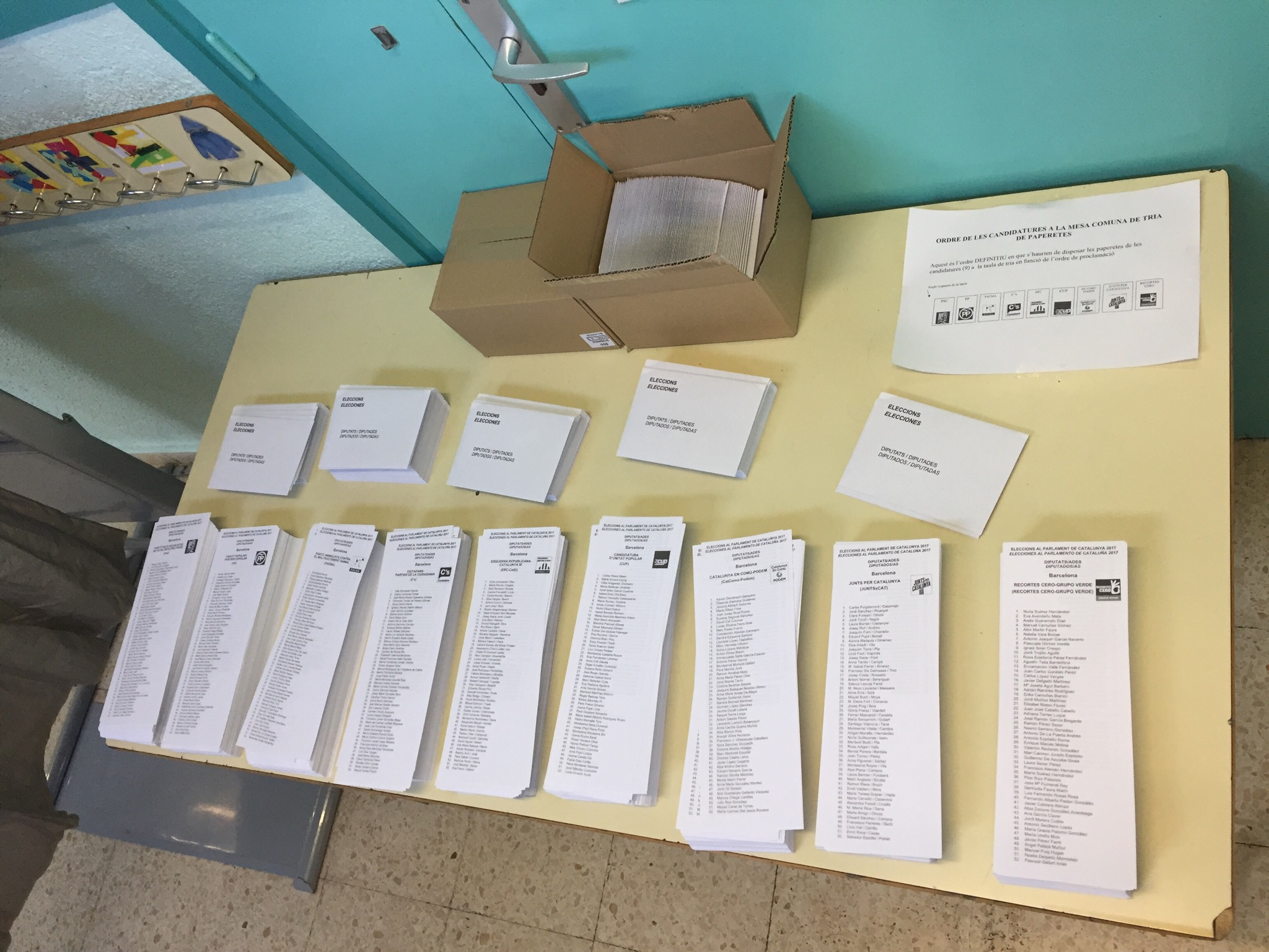 Eleccions al Parlament de Catalunya 2017 a Sabadell